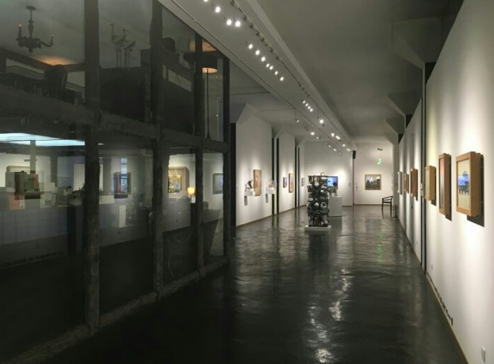 interior galería island6